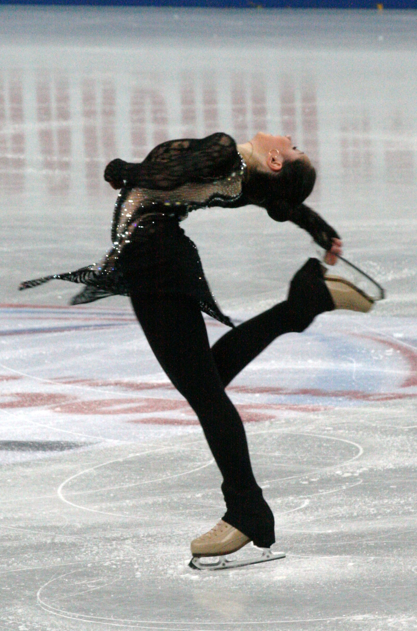 Елизавета Туктамышева (Россия) на финале Гран-при 2012-2013. Короткая программа.